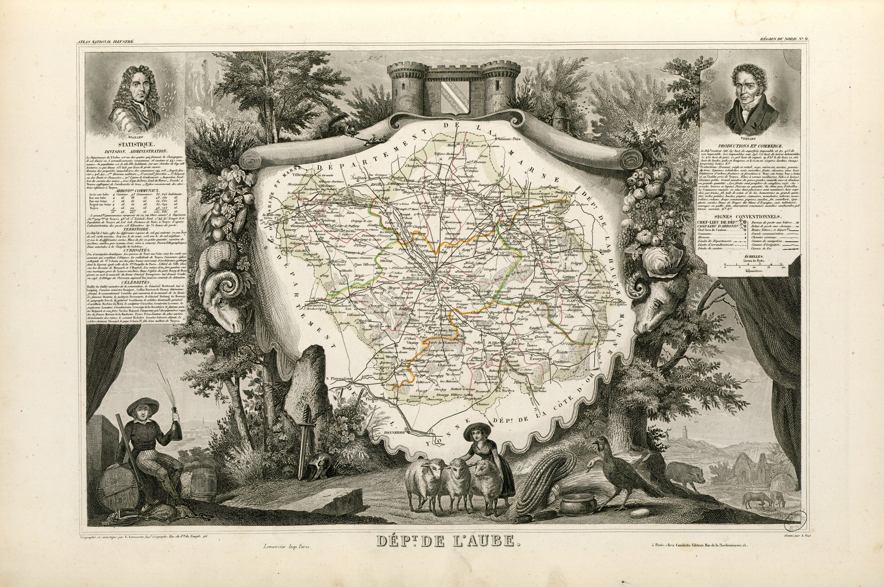 Titre complet du recueil : Atlas national illustré des 86 Départements et des Possessions de la France divisé par Arrondissements, Cantons et Communes avec le tracé de toutes les routes, chemins de fer et canaux. Dressé d'après les Travaux du Cadastre du Dépôt de la Guerre et des Ponts et Chaussées par V. Levasseur, Ingénieur Géographe attaché au Génie du Cadastre et de la Ville de Paris. Gravé sur acier par les meilleurs artistes. Imprimerie de Lemercier à Paris ou imprimerie Dupuich à Paris. Page de titre et 100 pl. en n. et b. et en coul. dont un tableau statistique et 2 cartes dépliantes. Ancely, René (1876 - 1966). Possesseur